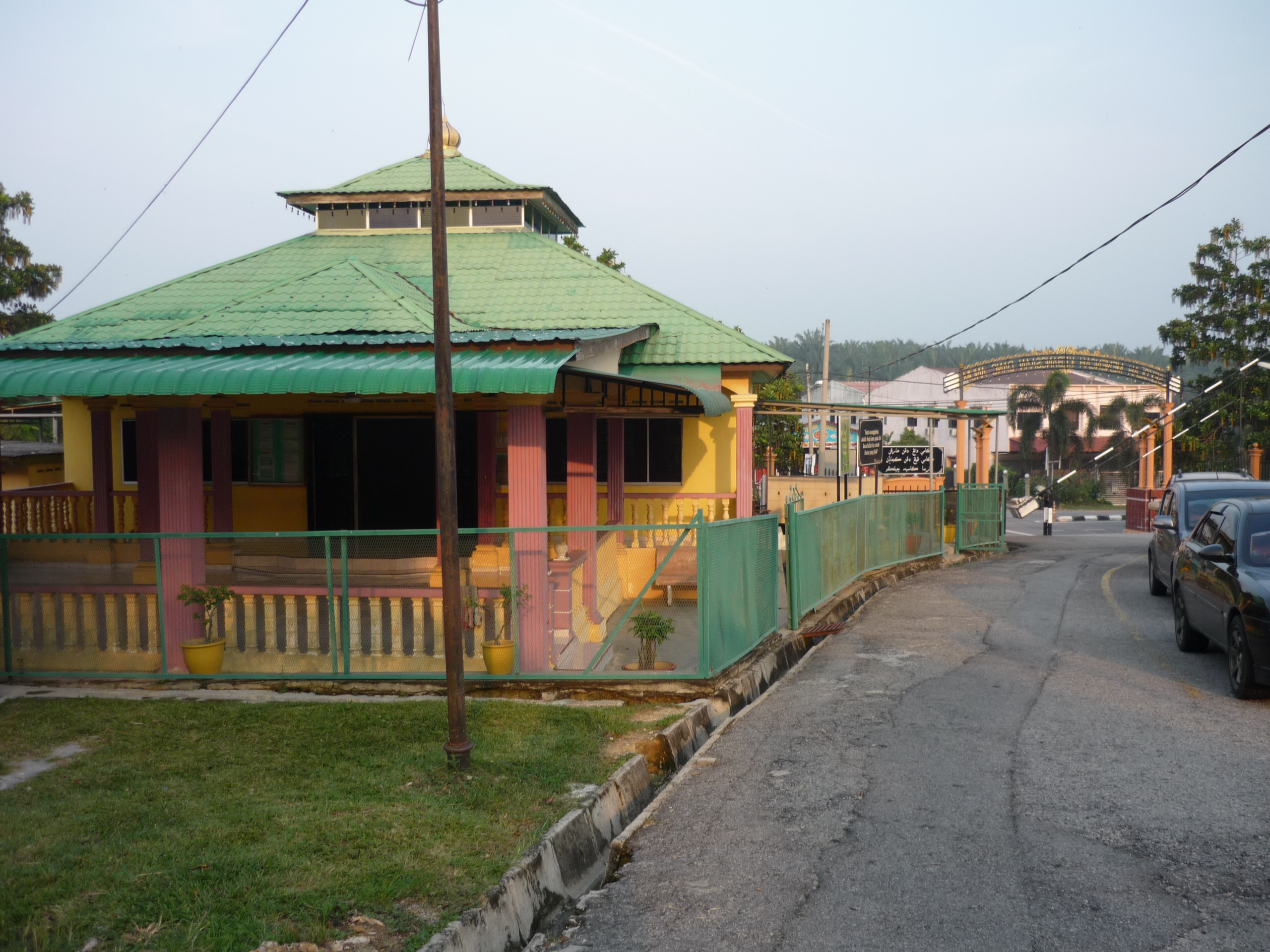 Surau Al Imtiyaz SMKDA